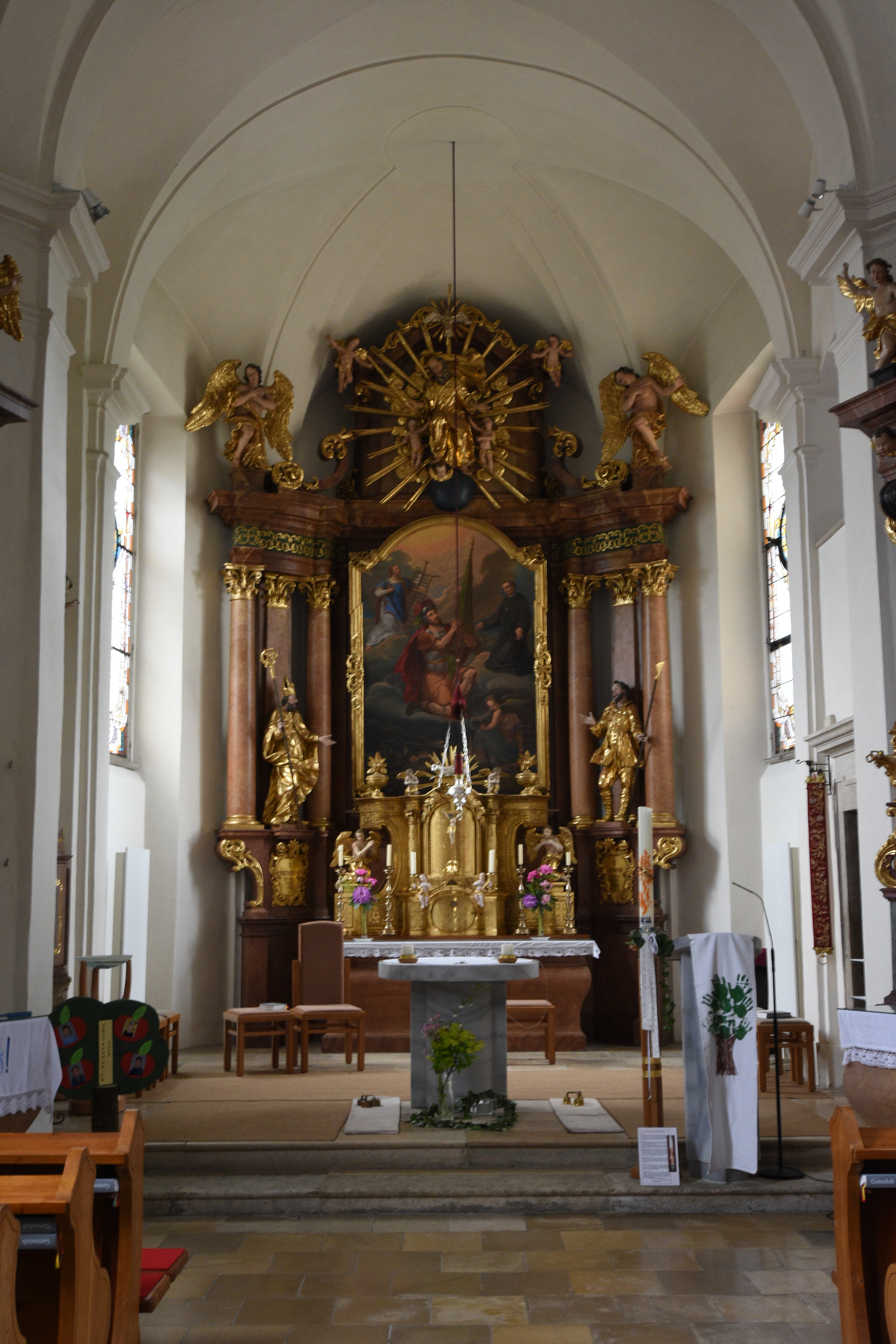 Kirche Rohr bei Hartberg Interior